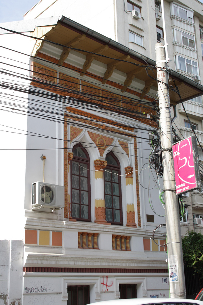 Casă, Str. Sevastopol 21 sector 1